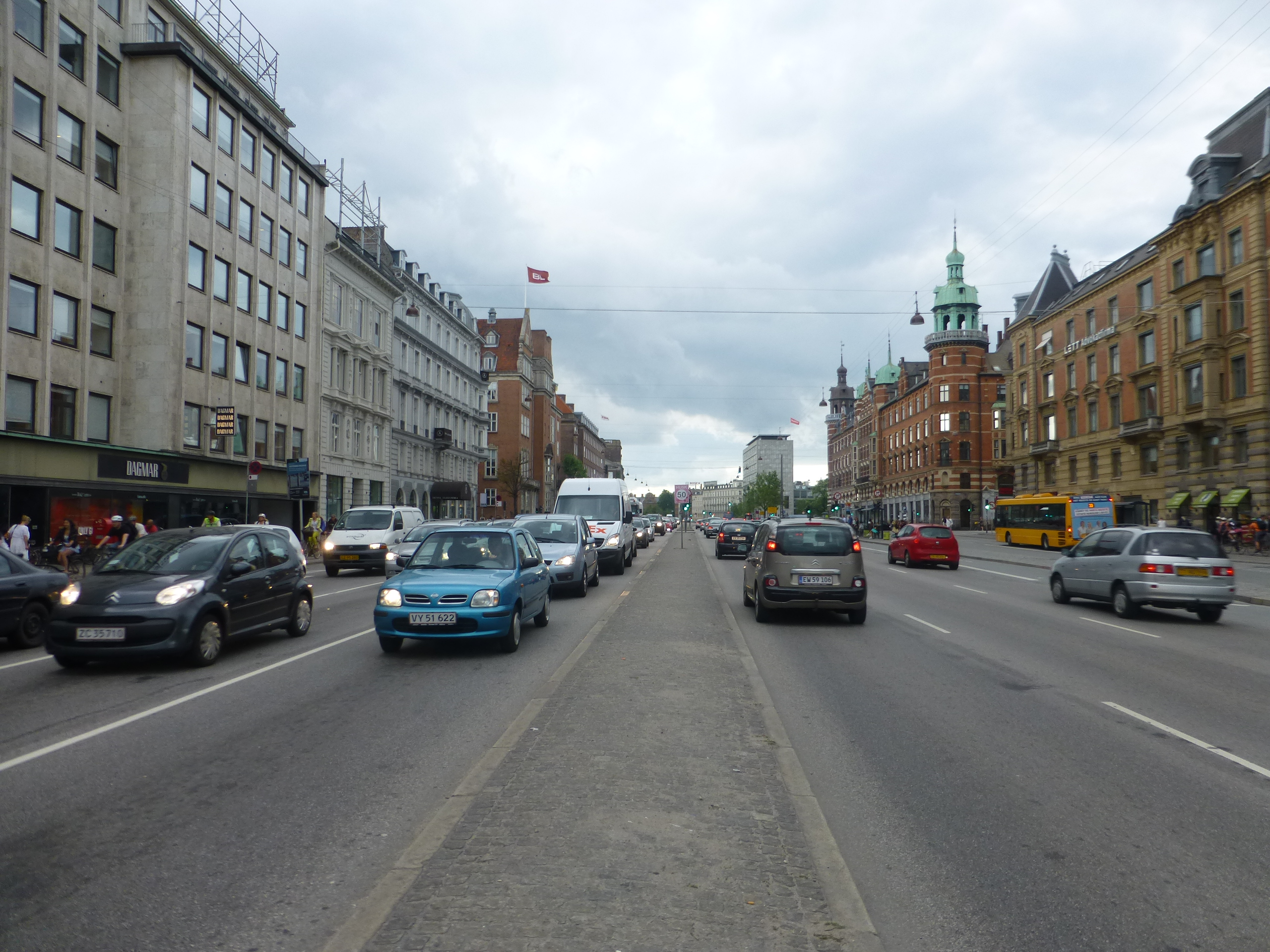 Rush hour on H.C. Andersens Boulevard in Copenhagen.